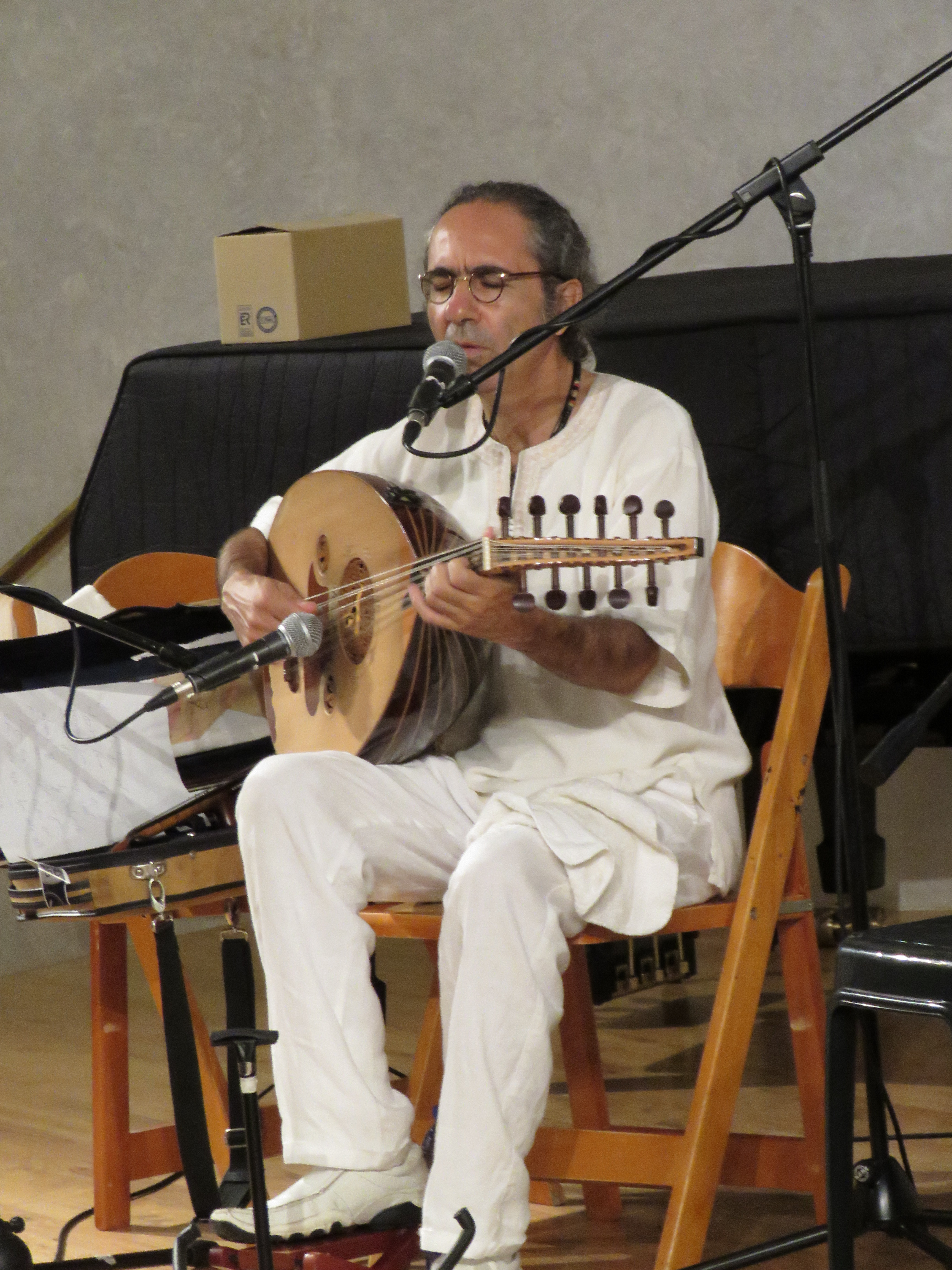 יאיר דלאל, מרכז פליציה בלומנטל למוזיקהת 22 באוגוסט 2015